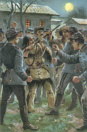 Illustration von Fritz Bergen in Andrew Brown der rote Spion. Eine Erzählung aus dem Wilden Westen Nordamerikas. Für die reifere Jugend von Friedrich J. Pajeken. Mit 4 Farbdruckbildern von Fritz Bergen. Stuttgart, Verlag von Wilhelm Effenberger. (F. Loewes Verlag.). (1894).